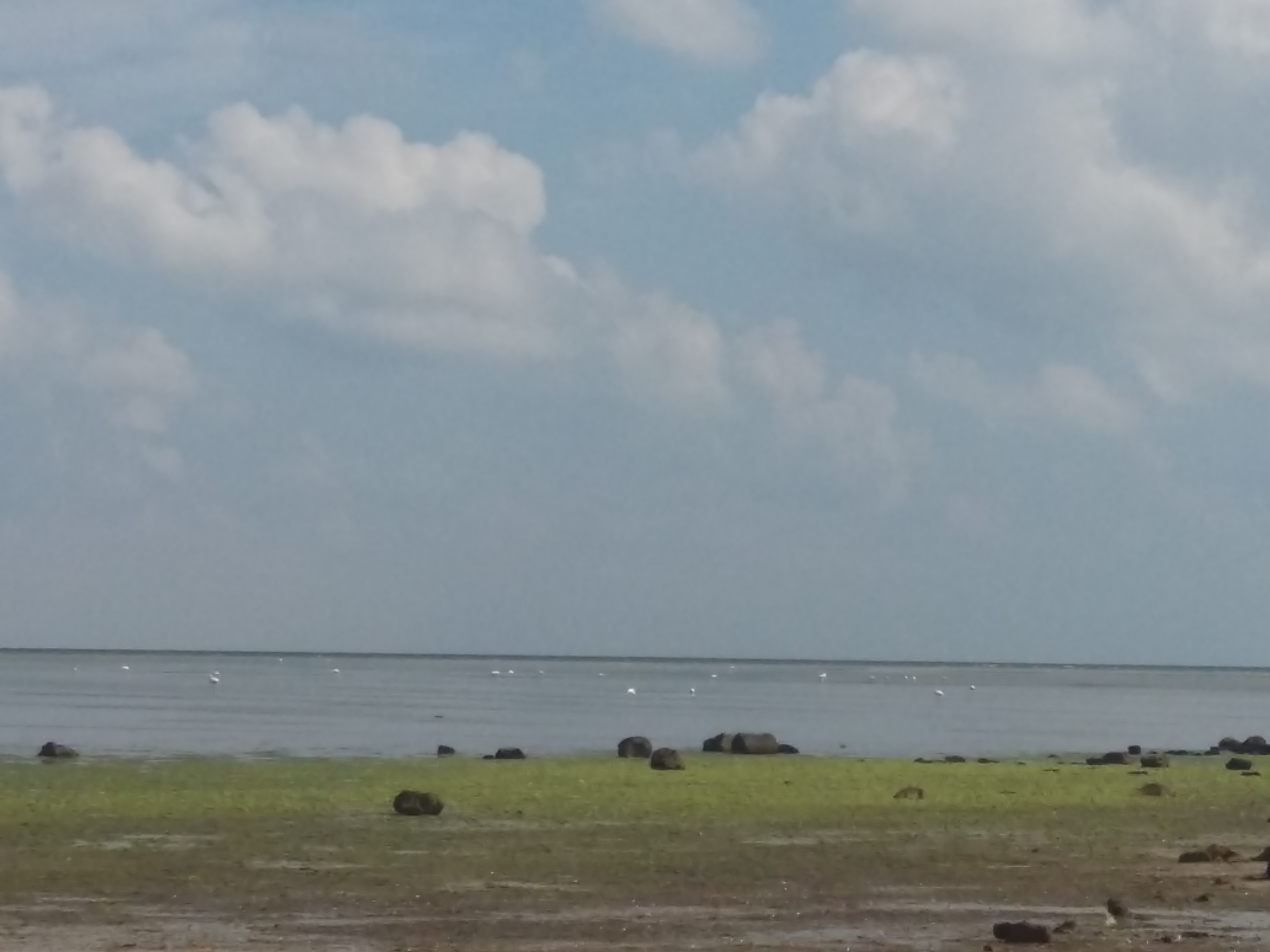 Golfe de Boughrara